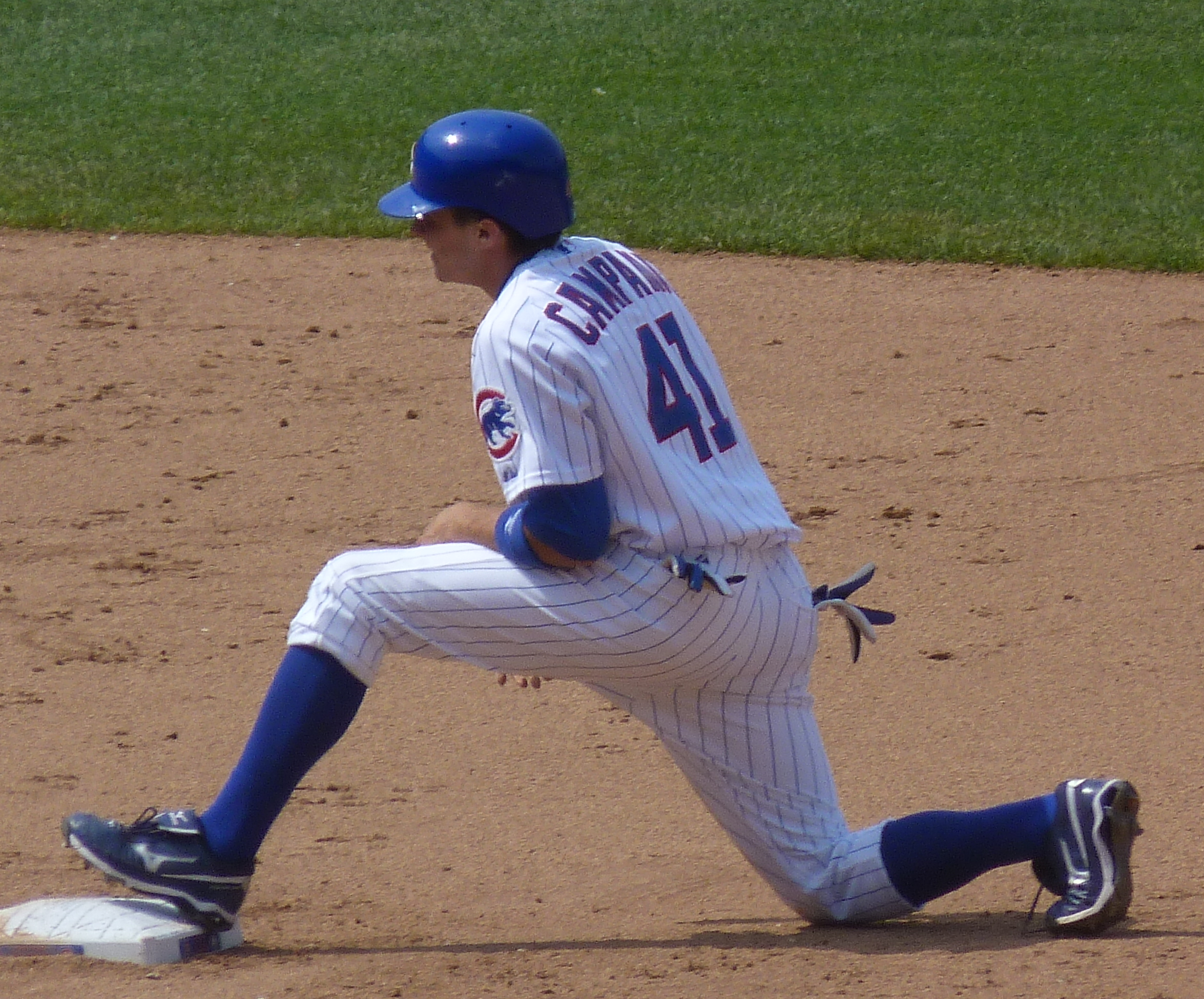 Tony Campana